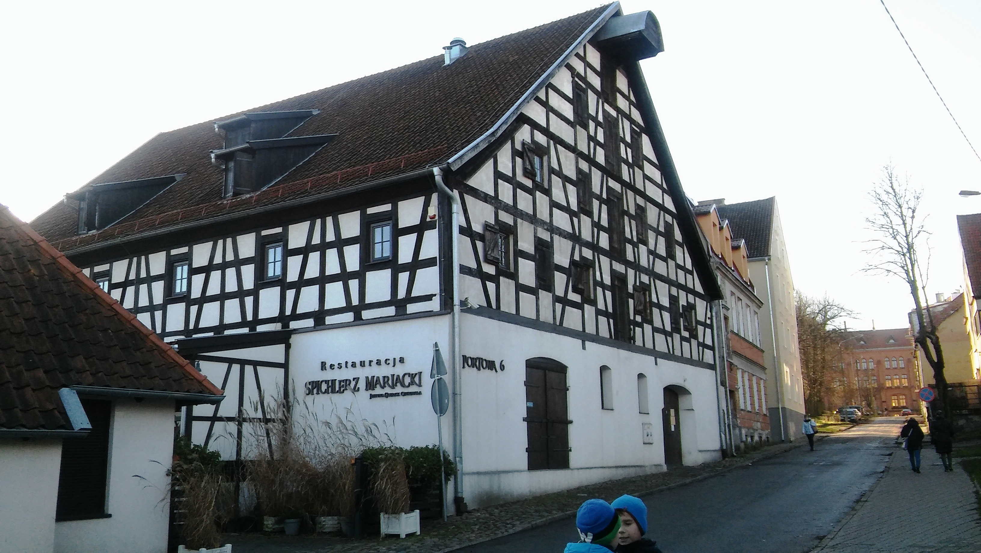 Spichlerz w Braniewie nad Pasłęką